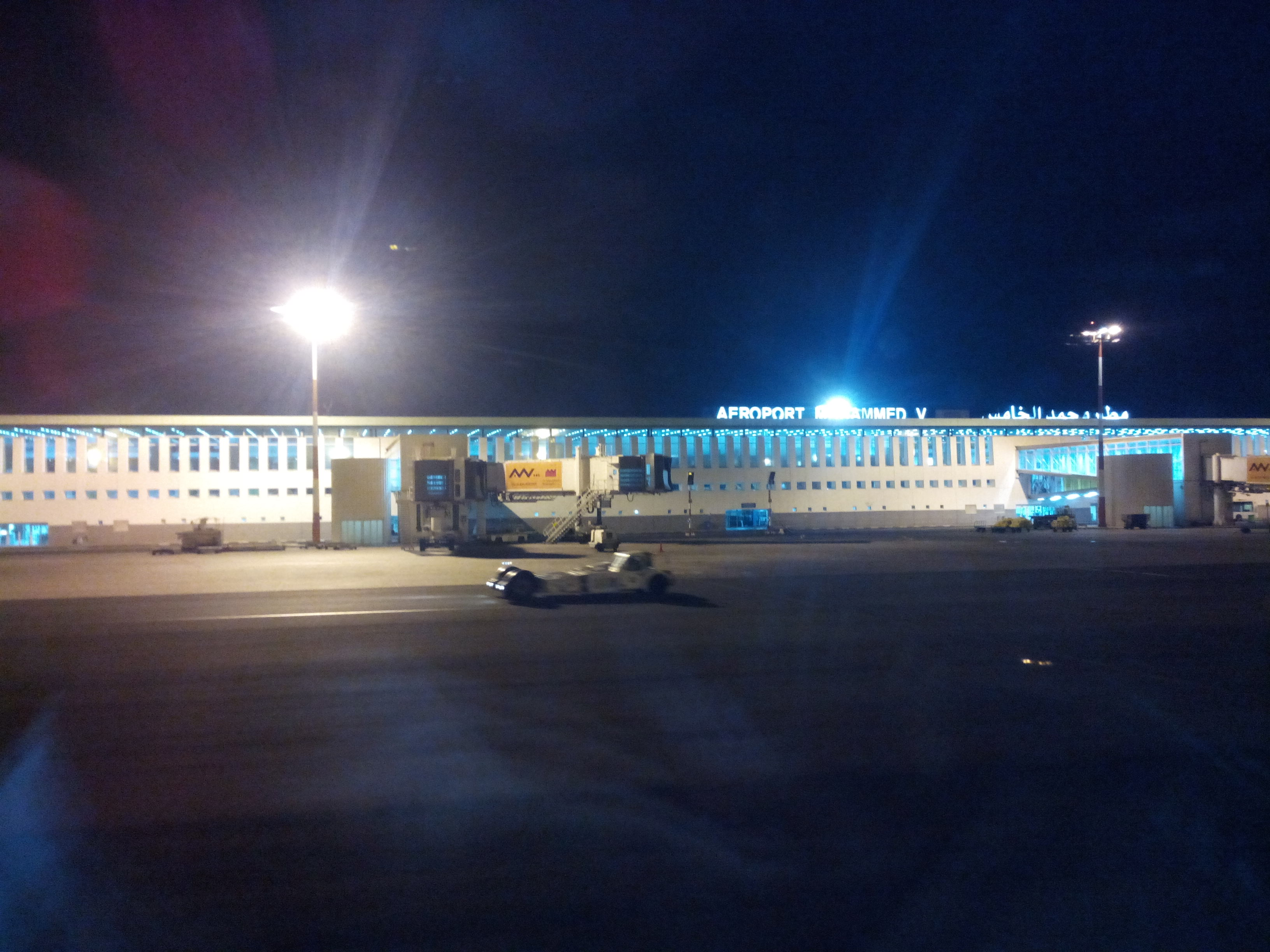 Vue de nuit de l'aéroport Mohammed V, depuis le hublot d'un avion